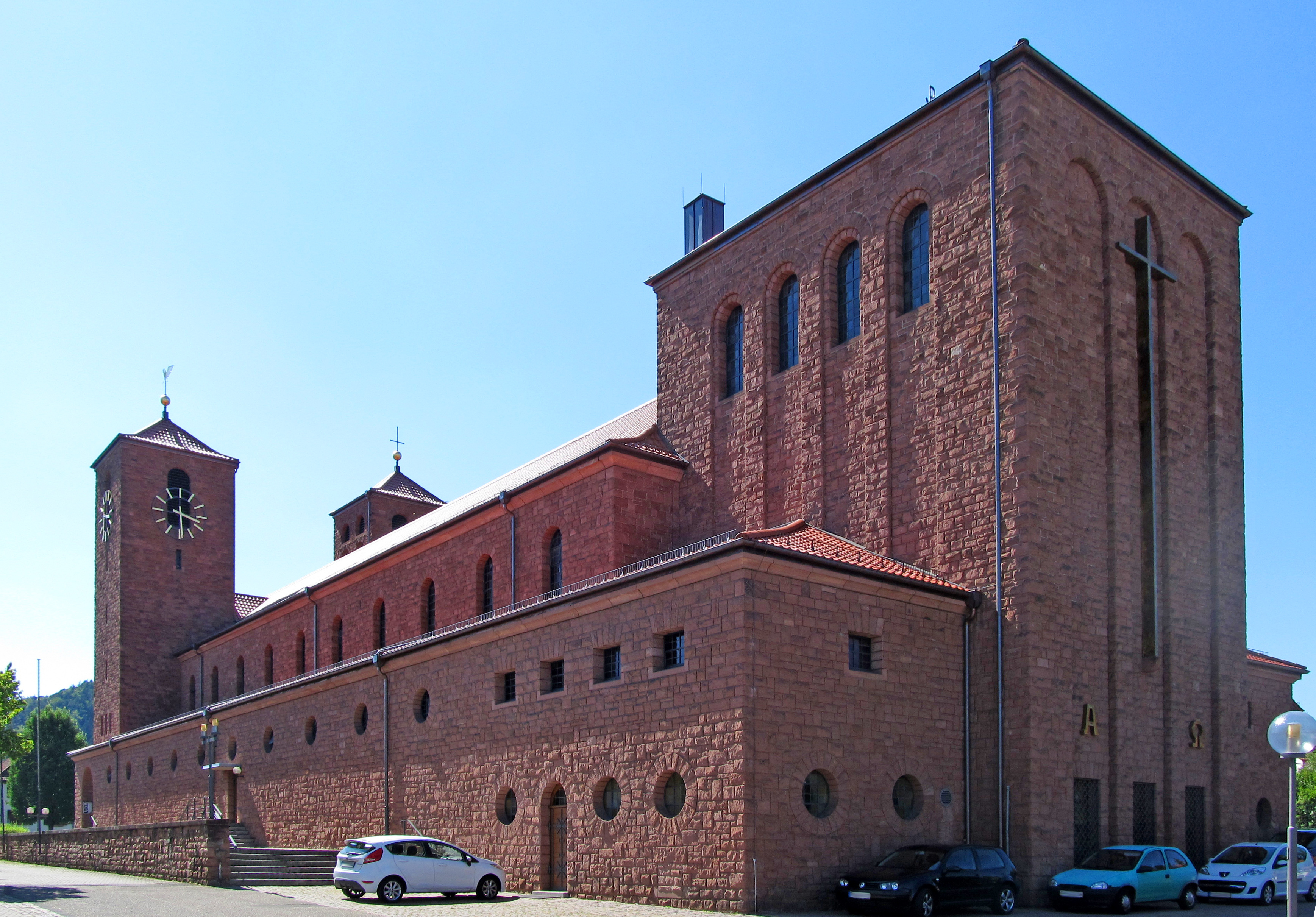 Die katholische Pfarrkirche Christkönig in Hauenstein, Kreis Südwestpfalz, Rheinland-Pfalz